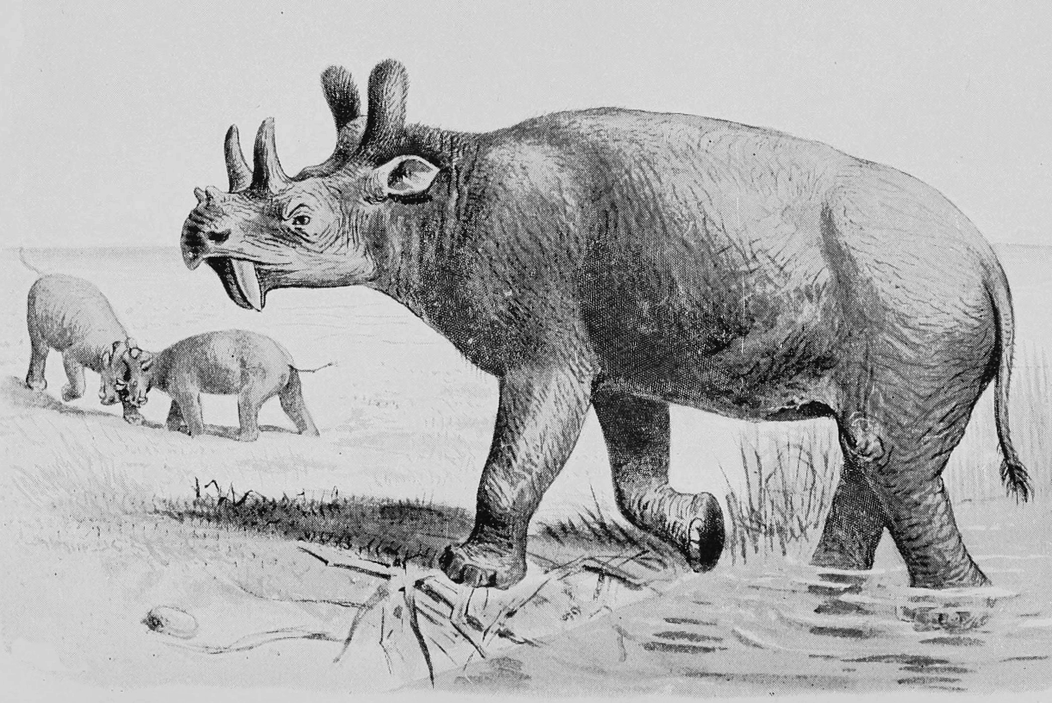 o Z